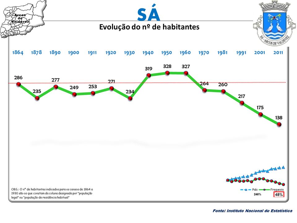 Censos 1864/2011